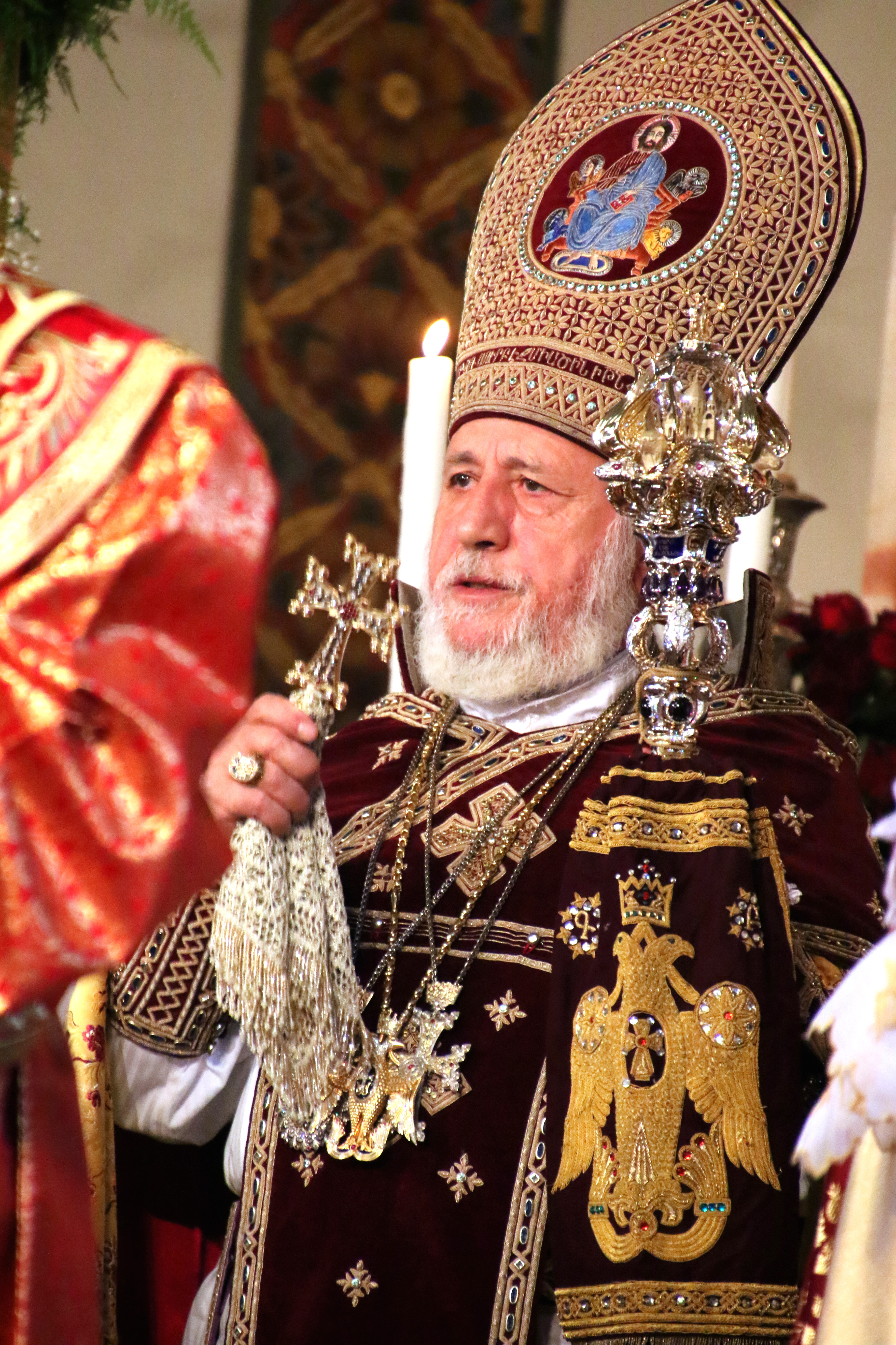 Le Catholicos chef de l'église orthodoxe apostolique arménienne